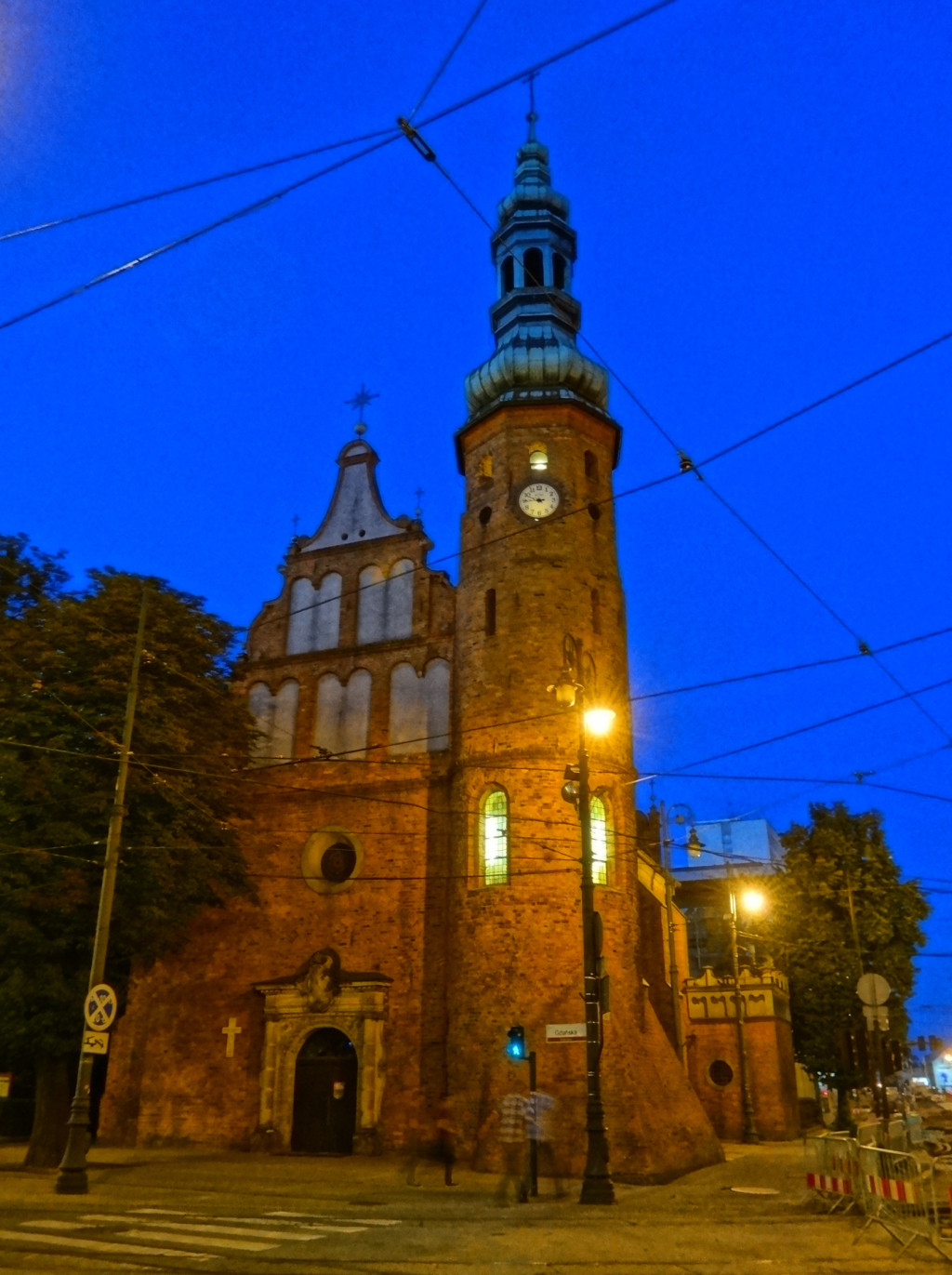 Kościół p.w. Wniebowzięcia Najświętszej Marii Panny w Bydgoszczy (zbud. 1582-1615, do 1835 r. kościół klasztorny klarysek bydgoskich)